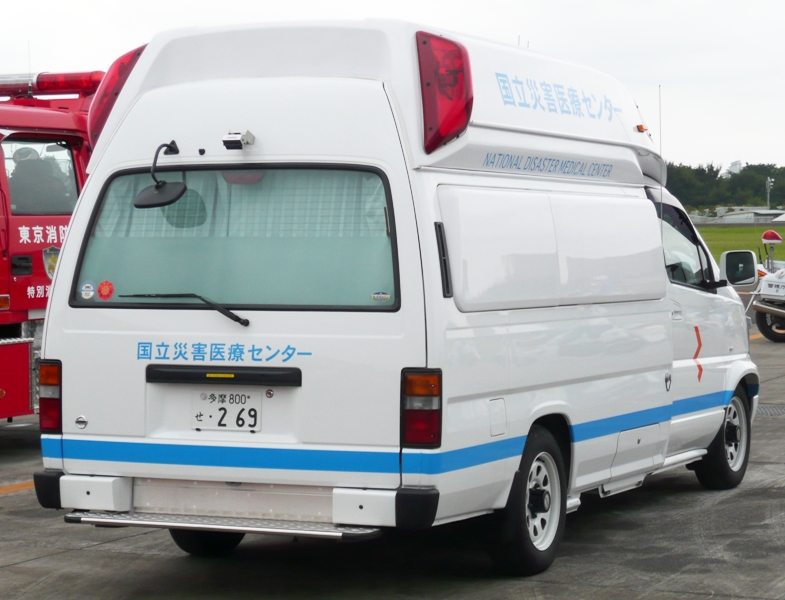 国立病院機構災害医療センターの救急車。立川防災航空祭にて撮影。